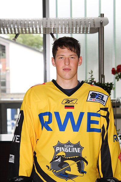 Patrick Hager im Dress der Krefeld Pinguine 2008/2009